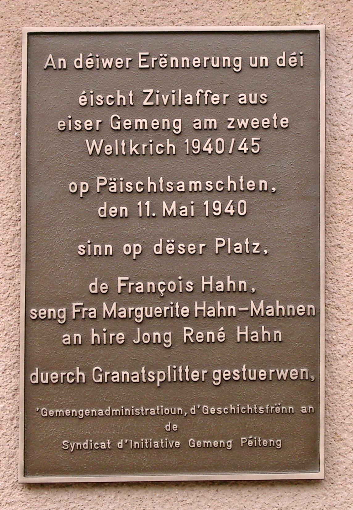 Gedenkplack am Schoulhaff zu Péiteng